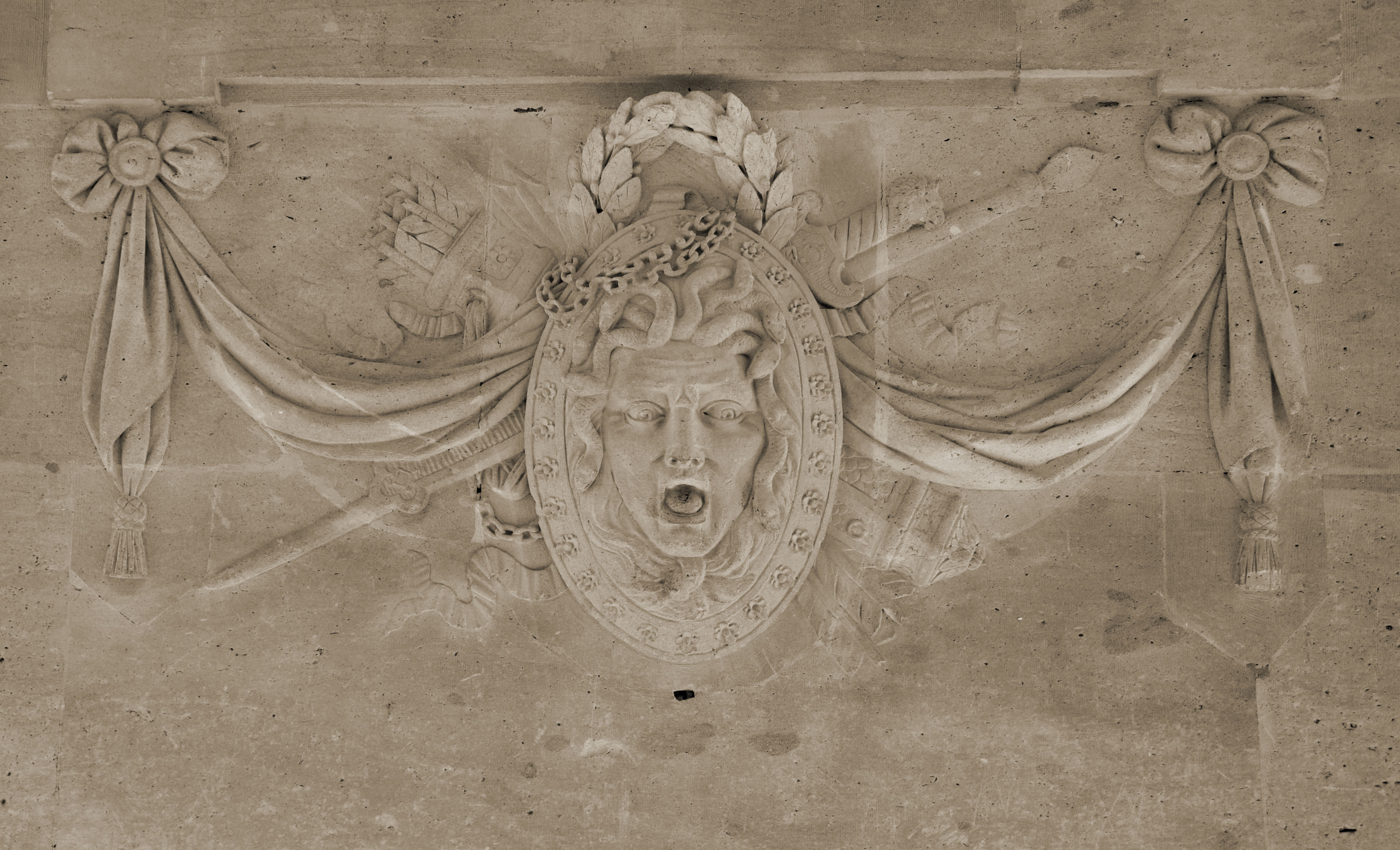 Petit Trianon - Bas relief tête de Méduse - 1er étage escalier